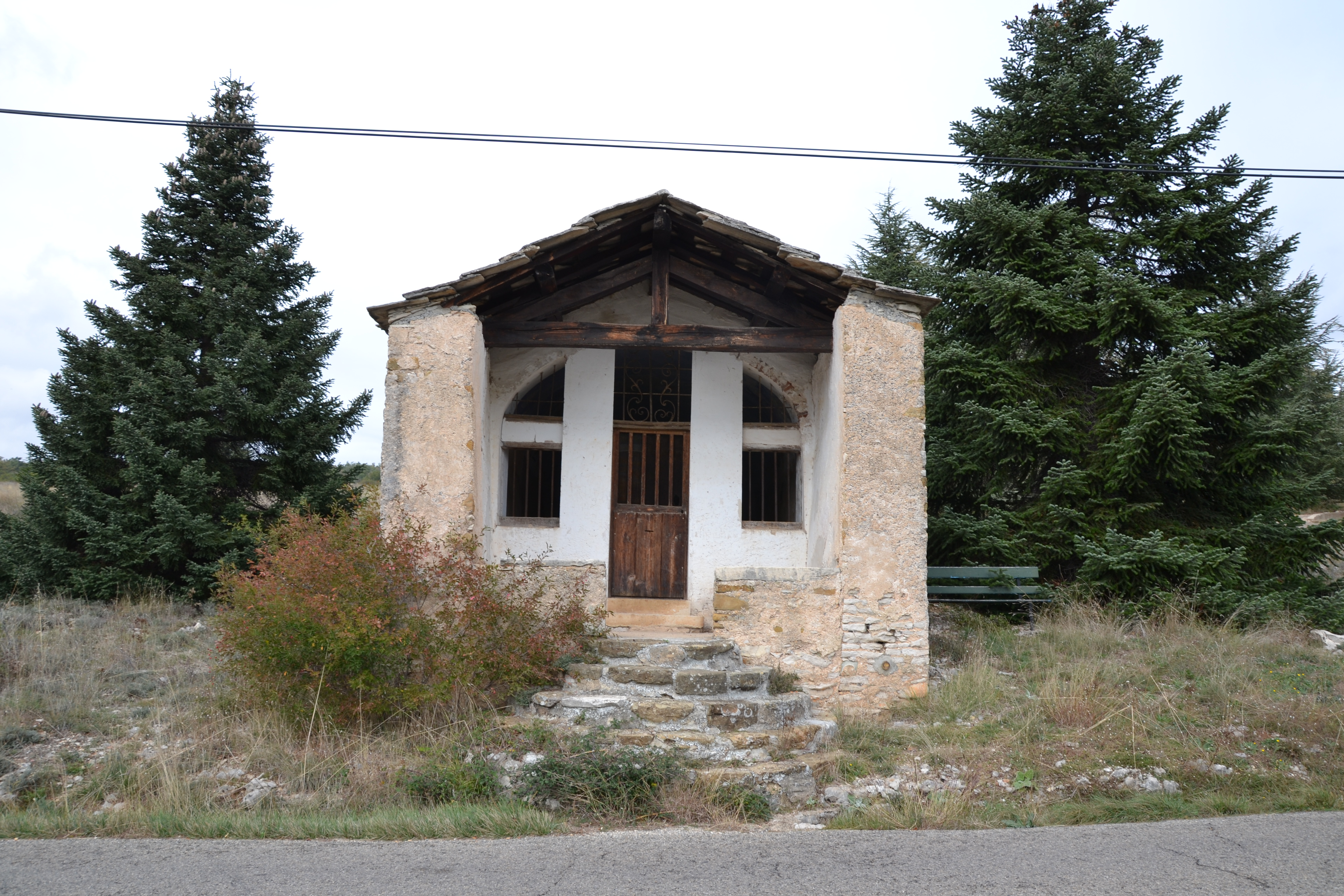 Chapelle Saint Joseph, près de Saint-Étienne-les-Orgues (04)